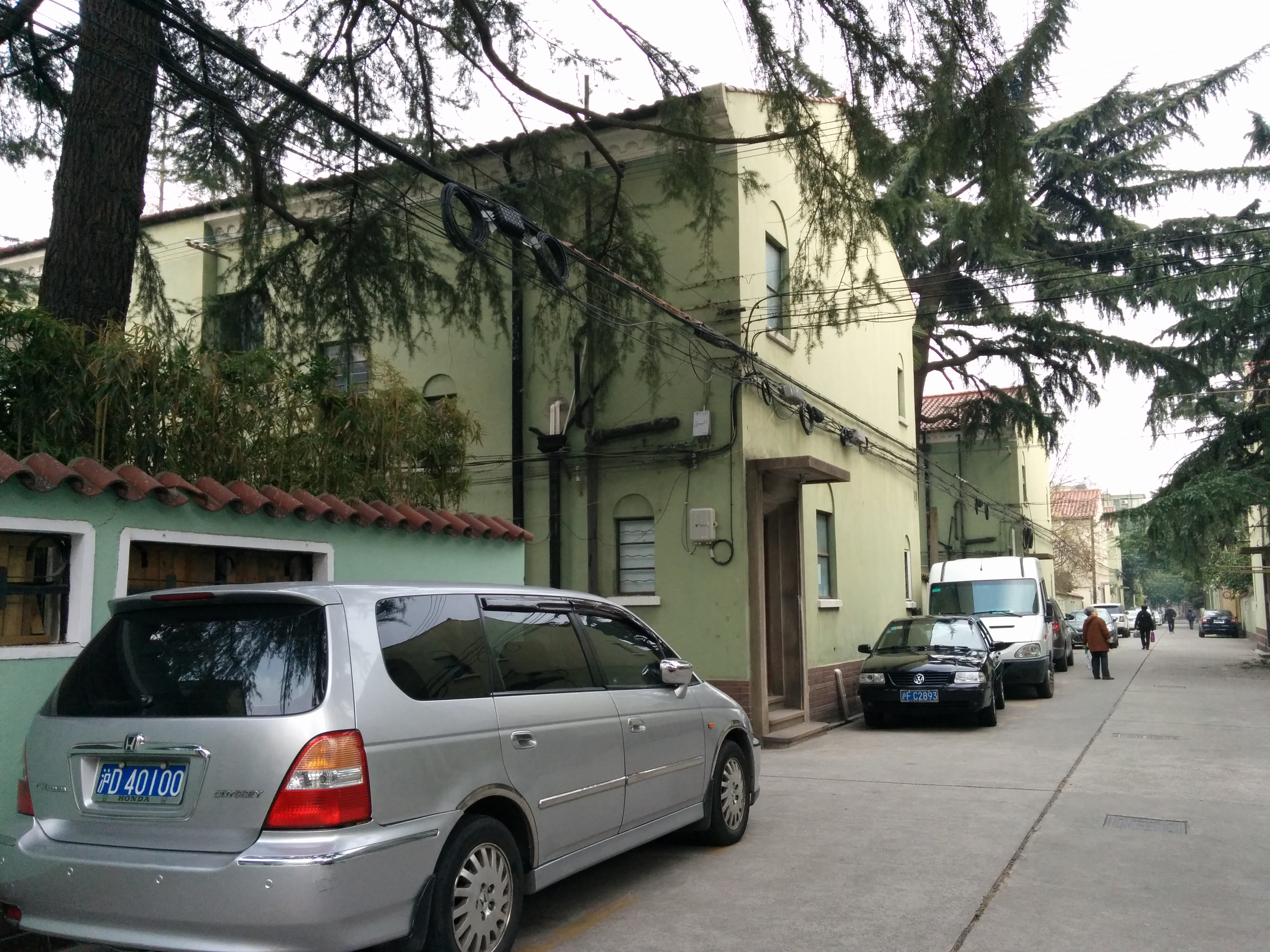 中文（中国大陆）: 上海新康花园